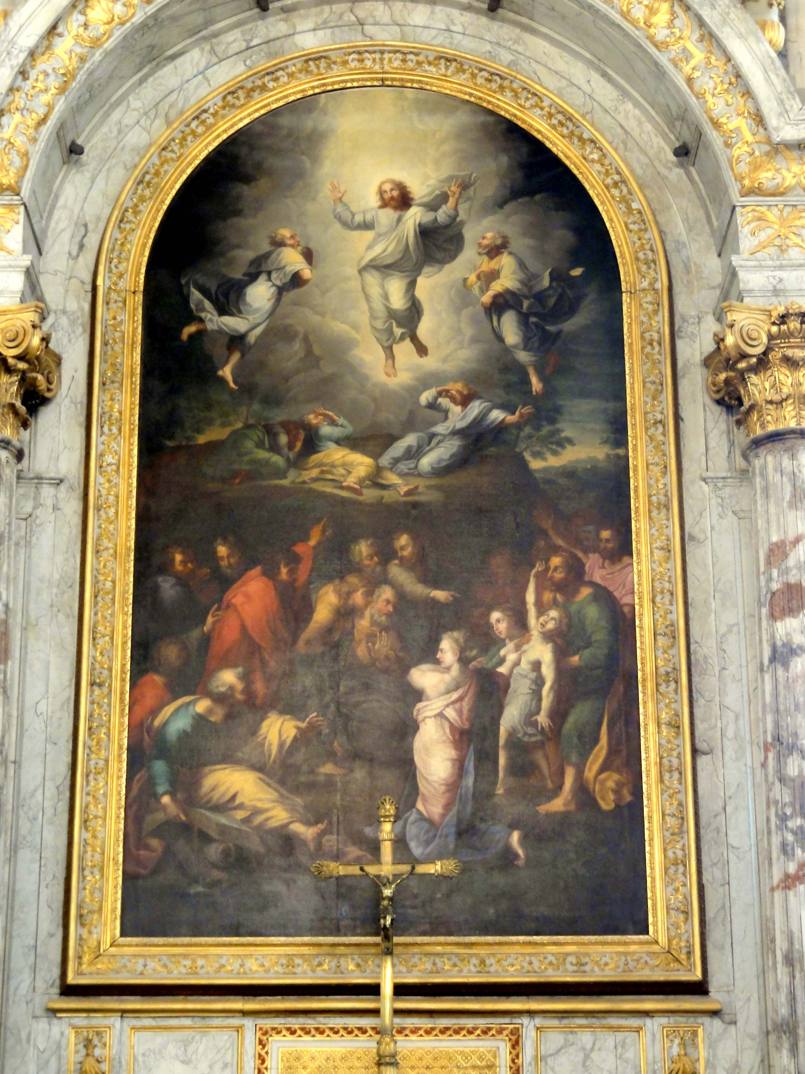 Retable du maître-autel, tableau - La Transfiguration.